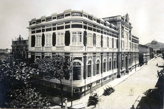 Biblioteca Pública Estadual do Amazonas.